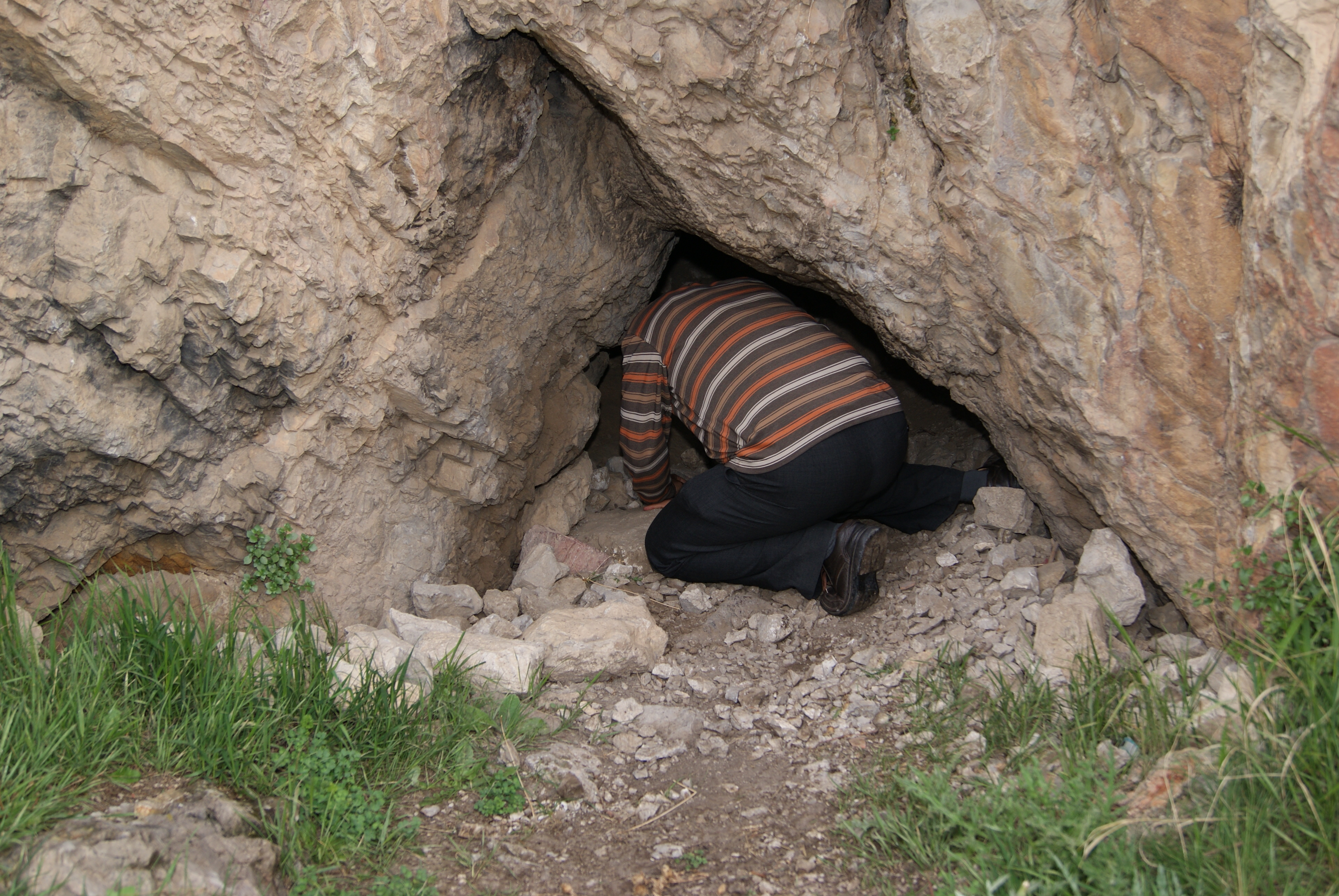 اگر میخواهید به انتهای غار بروید شما باید از این ورودی عبور کنید